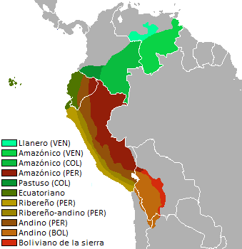 Variedades lingüísticas del español de las tierras altas.